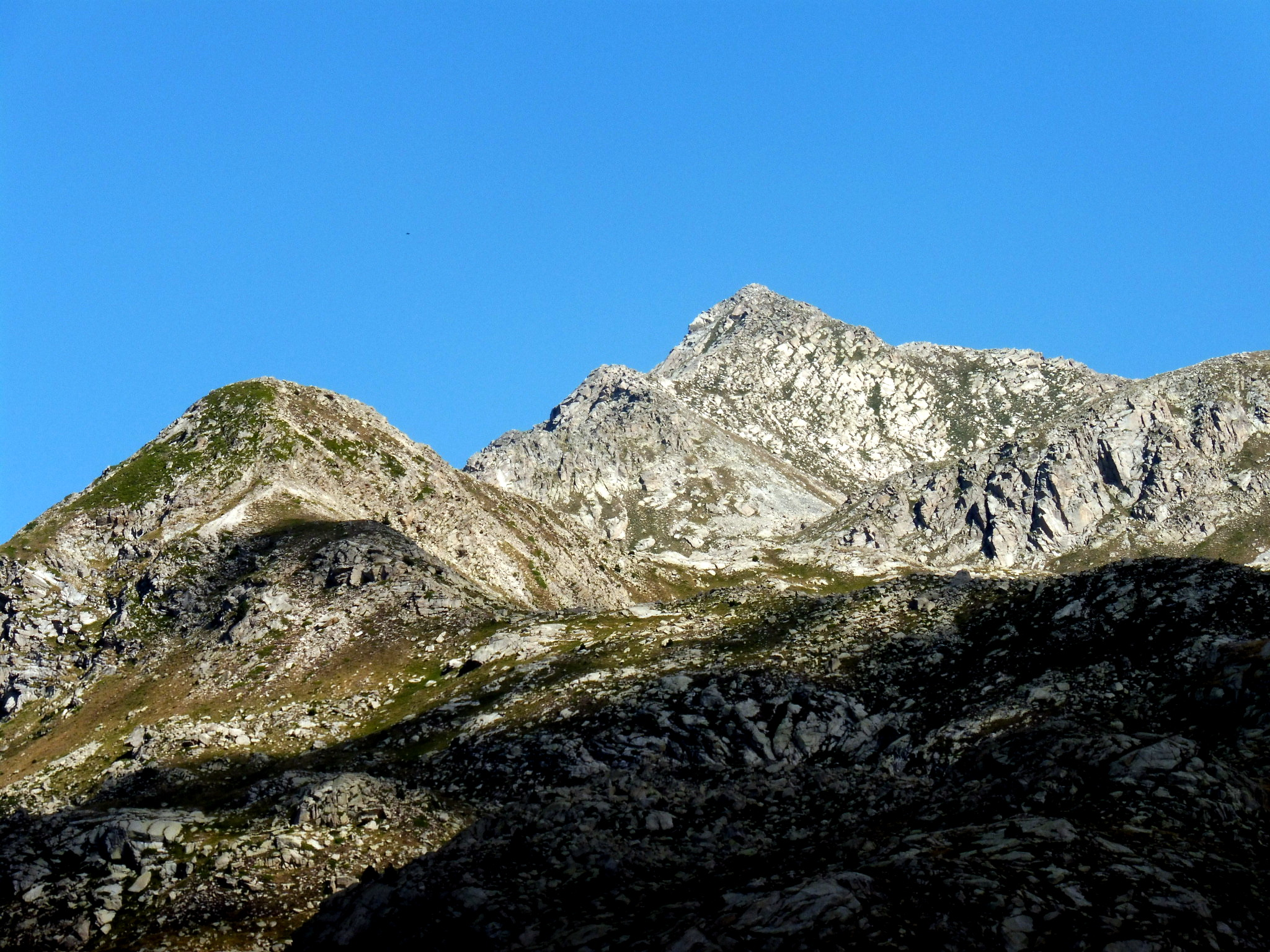 El Pic Tort des de la Coma d'Espòs (Estanys de Cabdella - Pallars Jussà) This is a a photo of a natural area in Catalonia, Spain, with id: ES510081